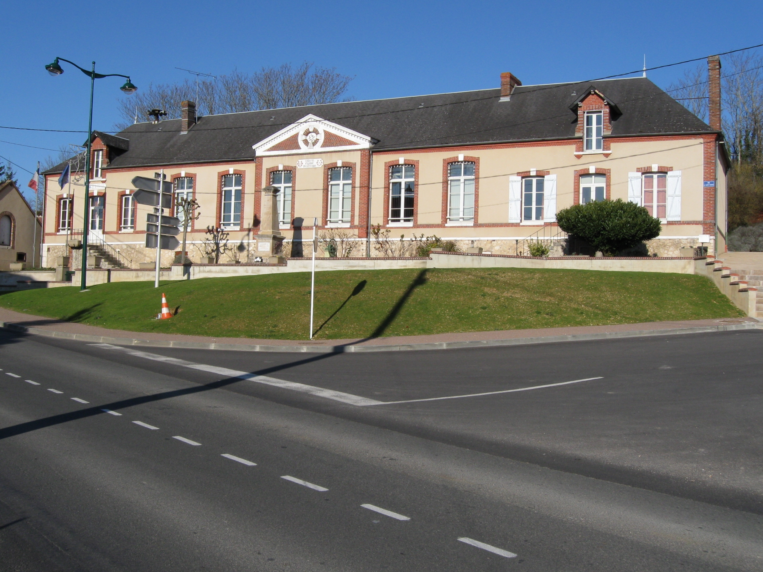 Saint-Germain-des-Prés, la mairie.